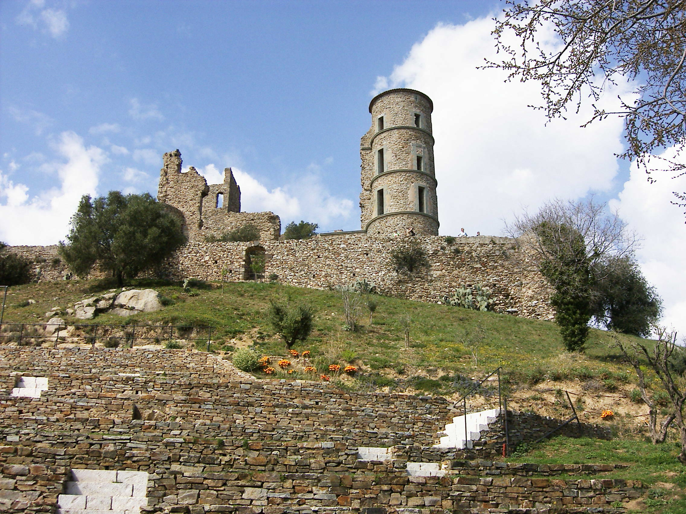 Die Burg in Grimaud – Frankreich/Département Var/Grimaud/Burgbering .